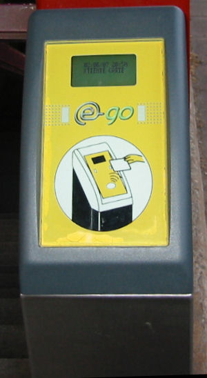 Eng Borne fir déi elektronesch Ticketen am kader vum Projet e-go ze validéieren